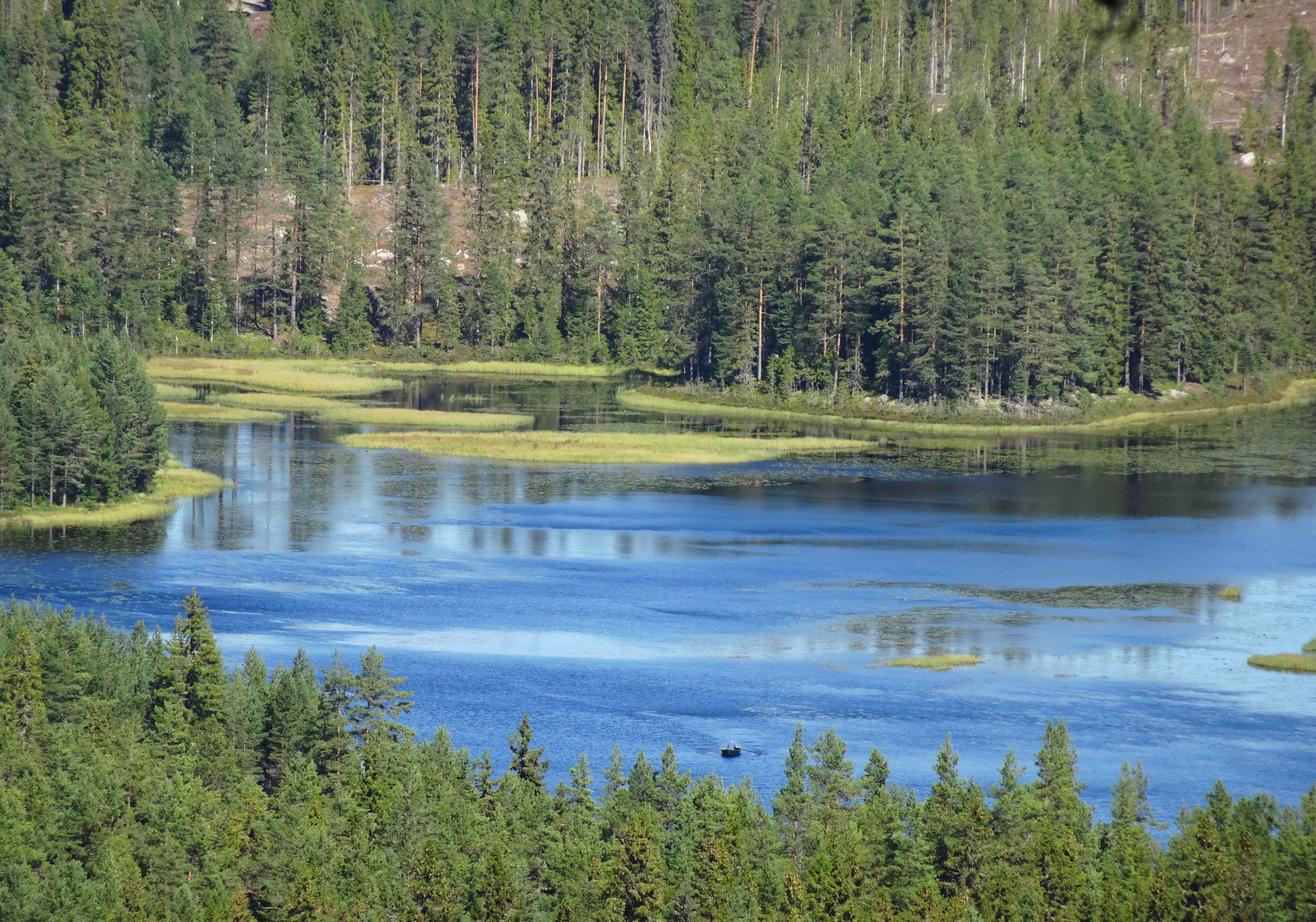 Sjön Saxdalen